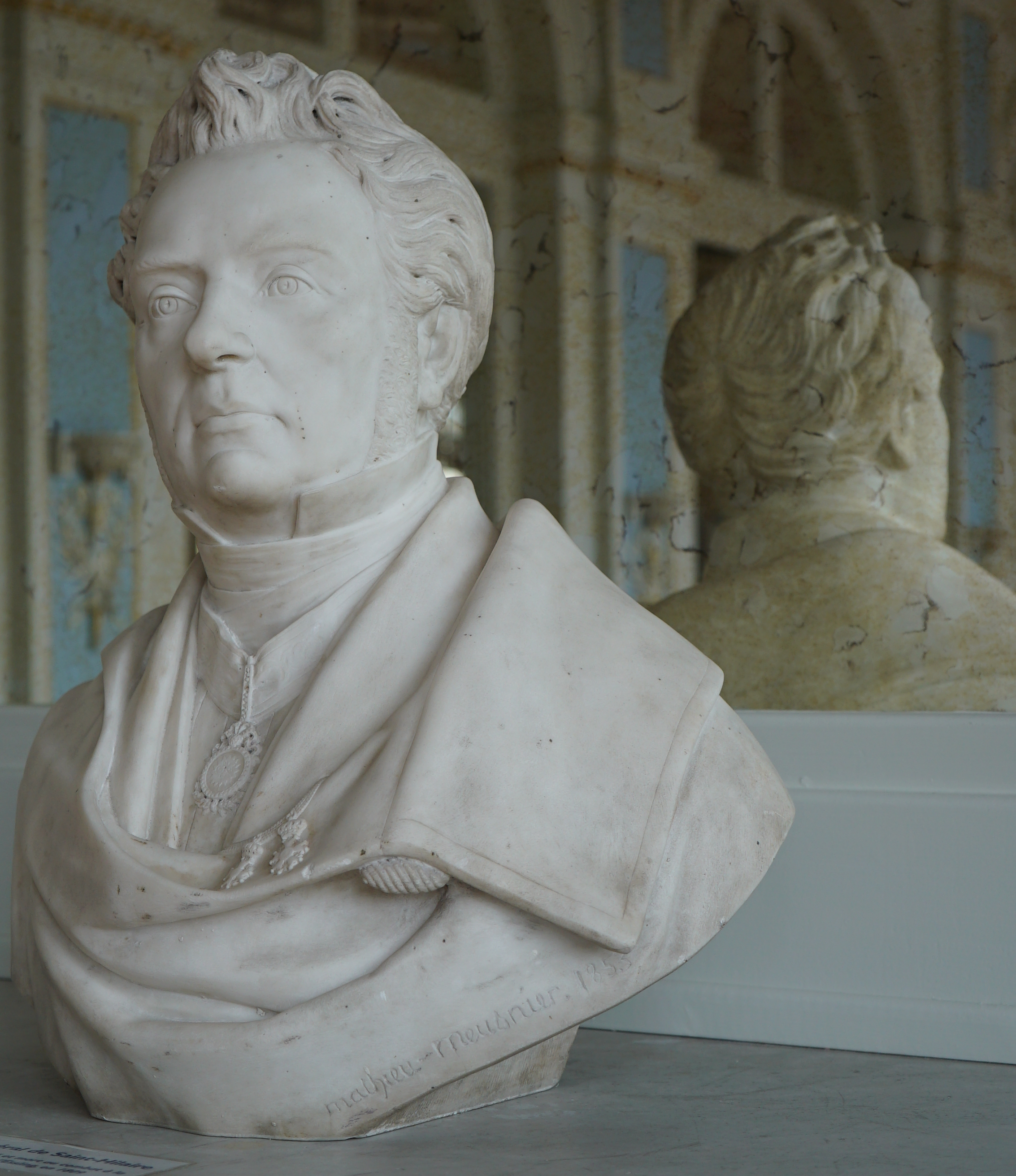 intérieur de l'Hôtel de Ville de Laon